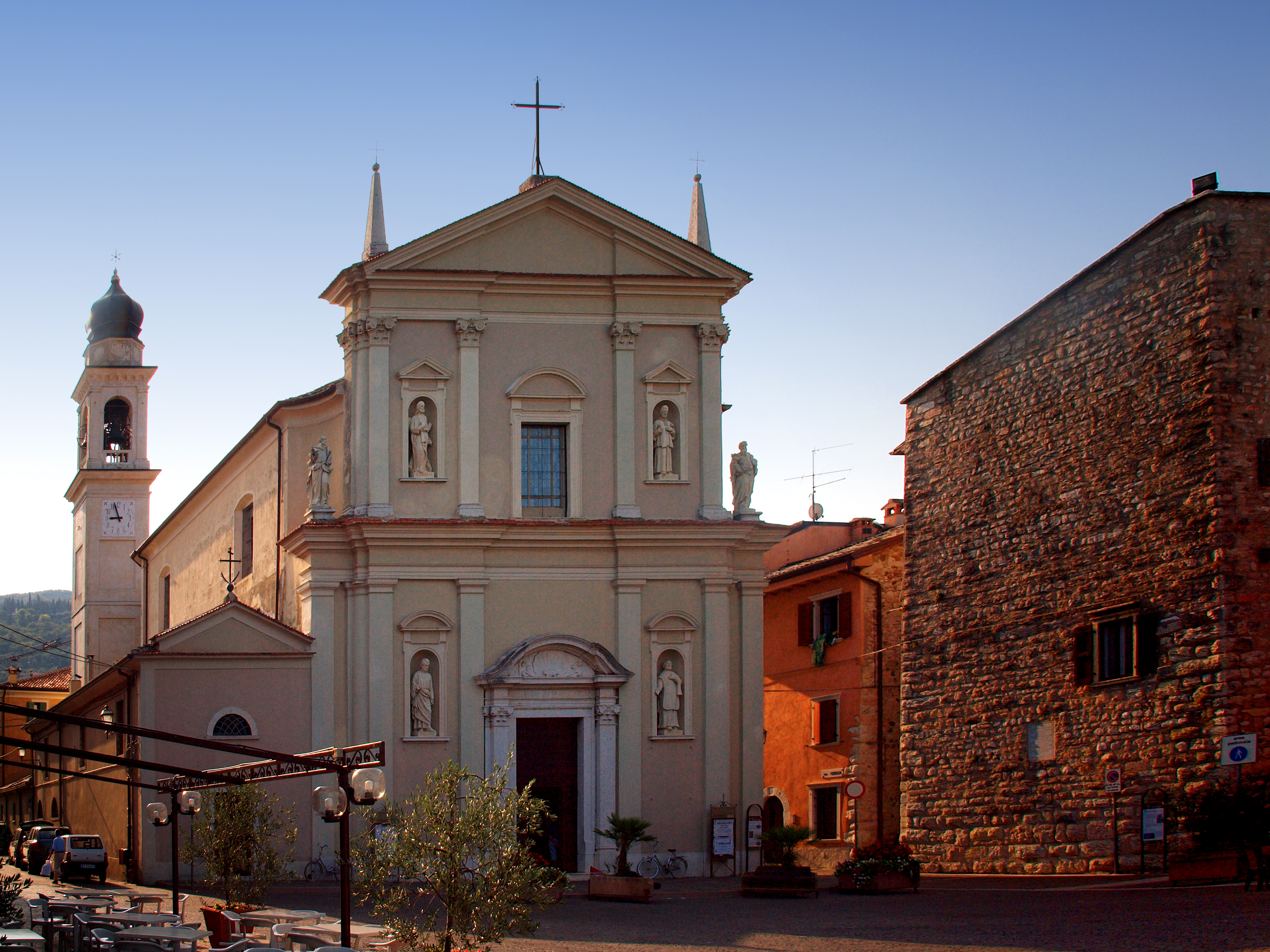 Torri del Benaco - Eglise St Pierre et St Paul